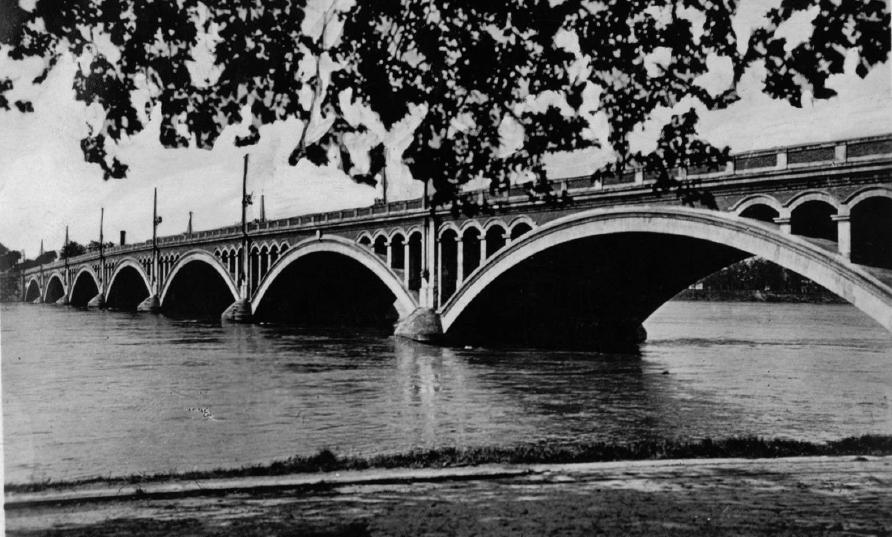 L’ancien pont du Maréchal Joffre vu de la rive sud (construit en 1905, détruit en 1940) sur la Loire, Orléans, Loiret, France